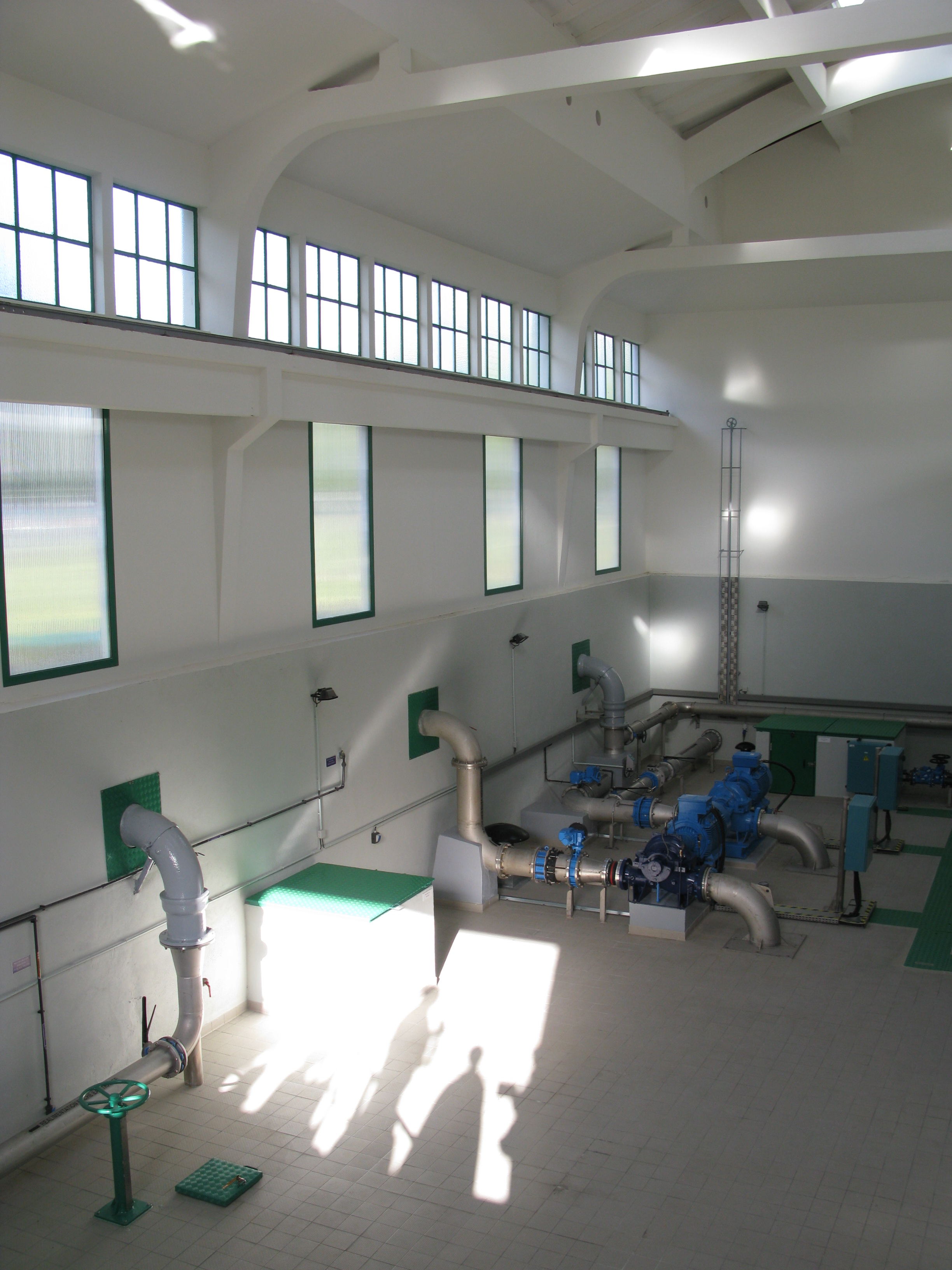 L'usine de potabilisation de Gamarde, lors des journées européennes du patrimoine 2011.